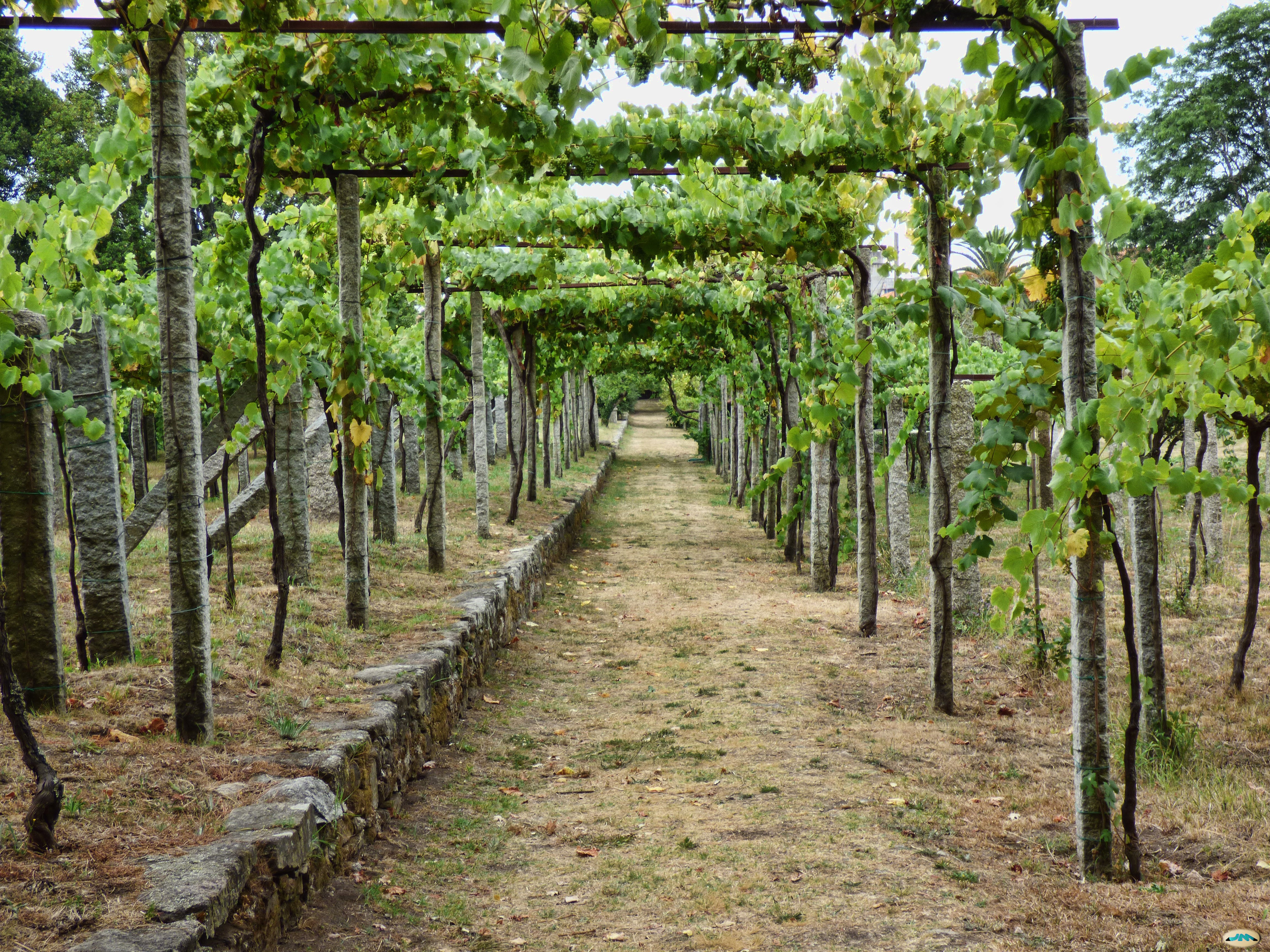 En el Pazo de Fefiñáns